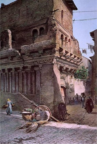 Casa di Cola di Rienzo in Rome (rione Ripa)